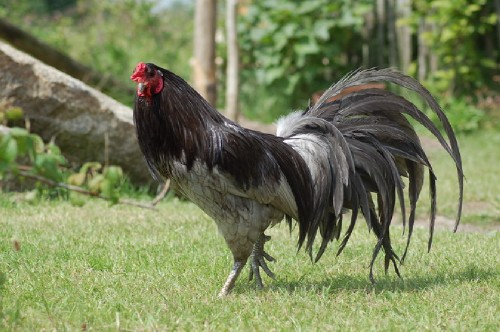 Blauwe sumatra's (Ayam gallak) zijn een zeldzame verschijning. Foto: Wanda Zwart